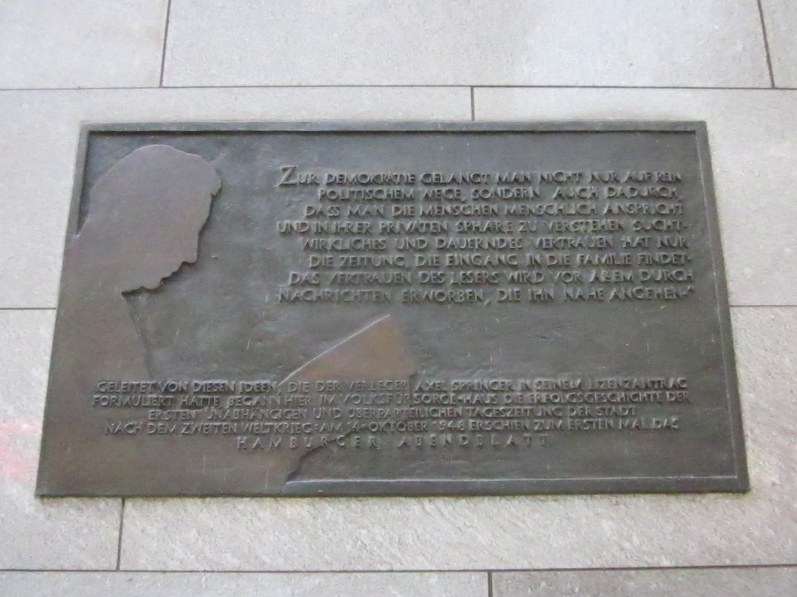 Tafel zur Erinnerung an die Gründung des Abendblattes durch Axel Springer am ehemaligen Volksfürsorge-Haus in der Straße An der Alster 59 in St. Georg.